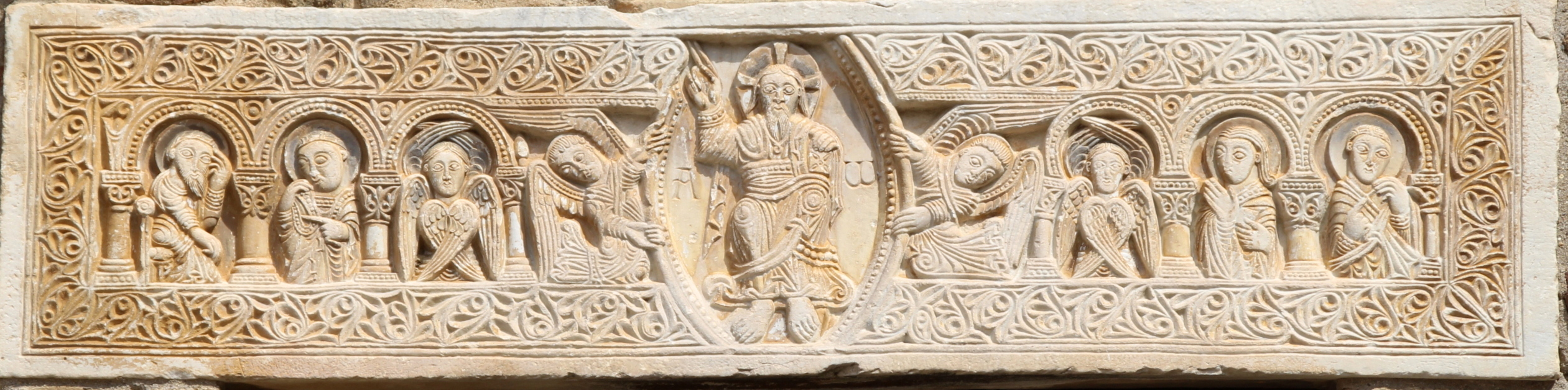 Linteau de l'ancienne Abbatiale Saint André à Saint André (Pyrénées Orientales)